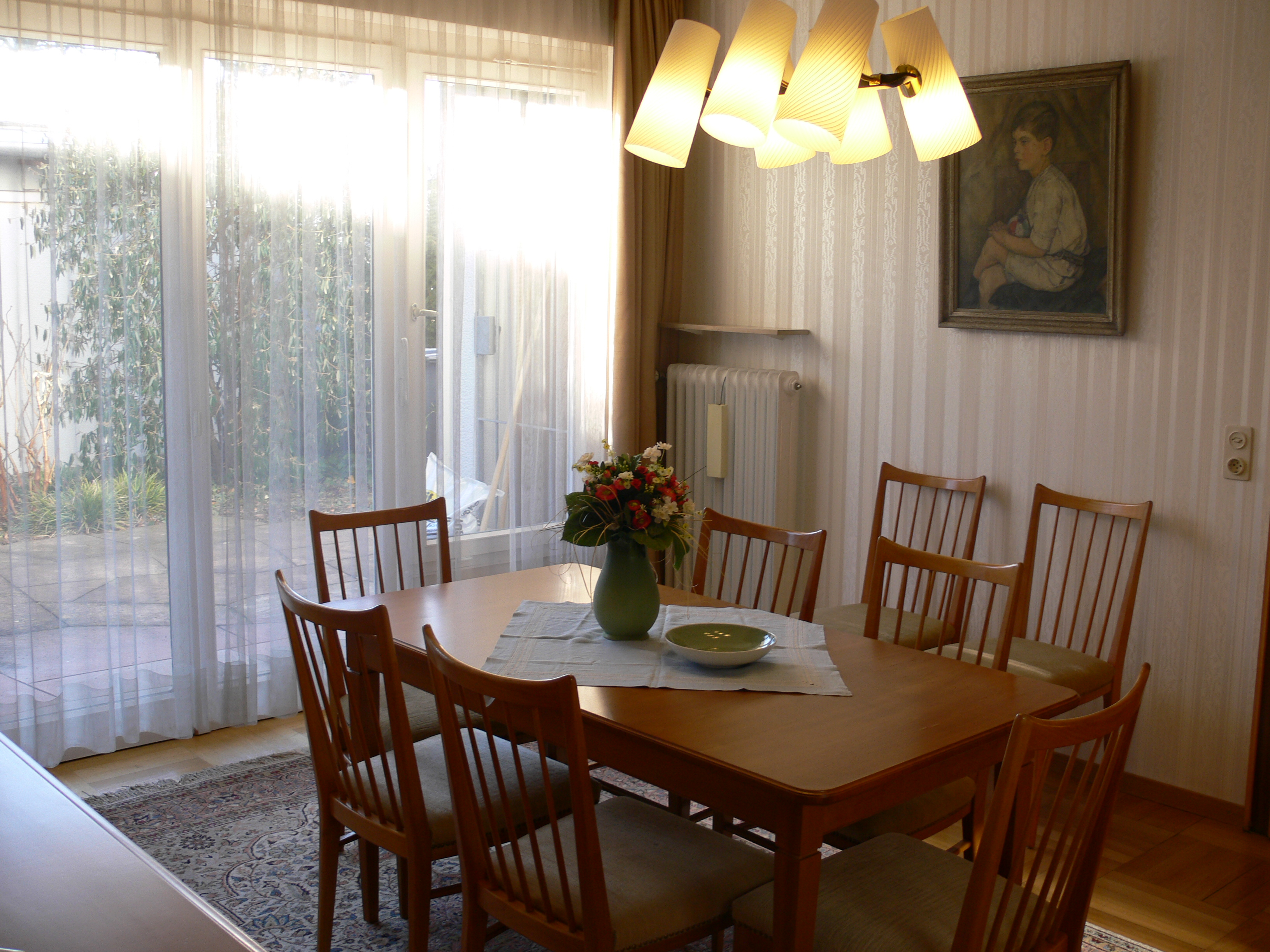 Theodor-Heuss-Haus, Feuerbacher Weg, Stuttgart-Nord Esszimmer